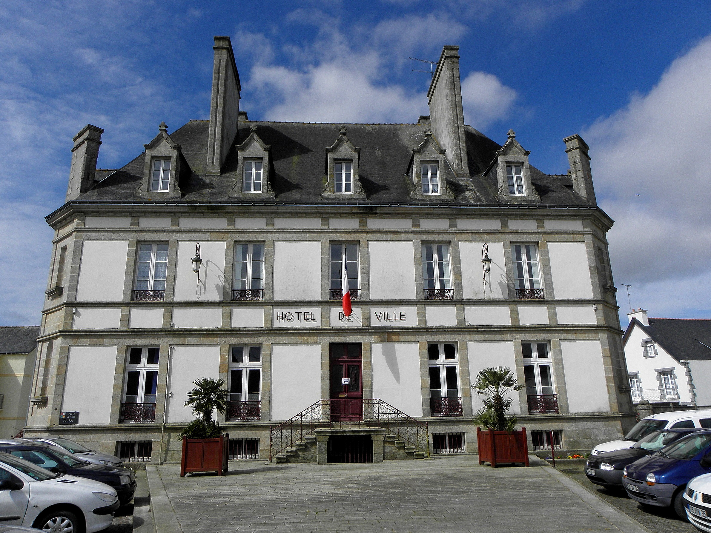 Mairie de Guémené-sur-Scorff (56).